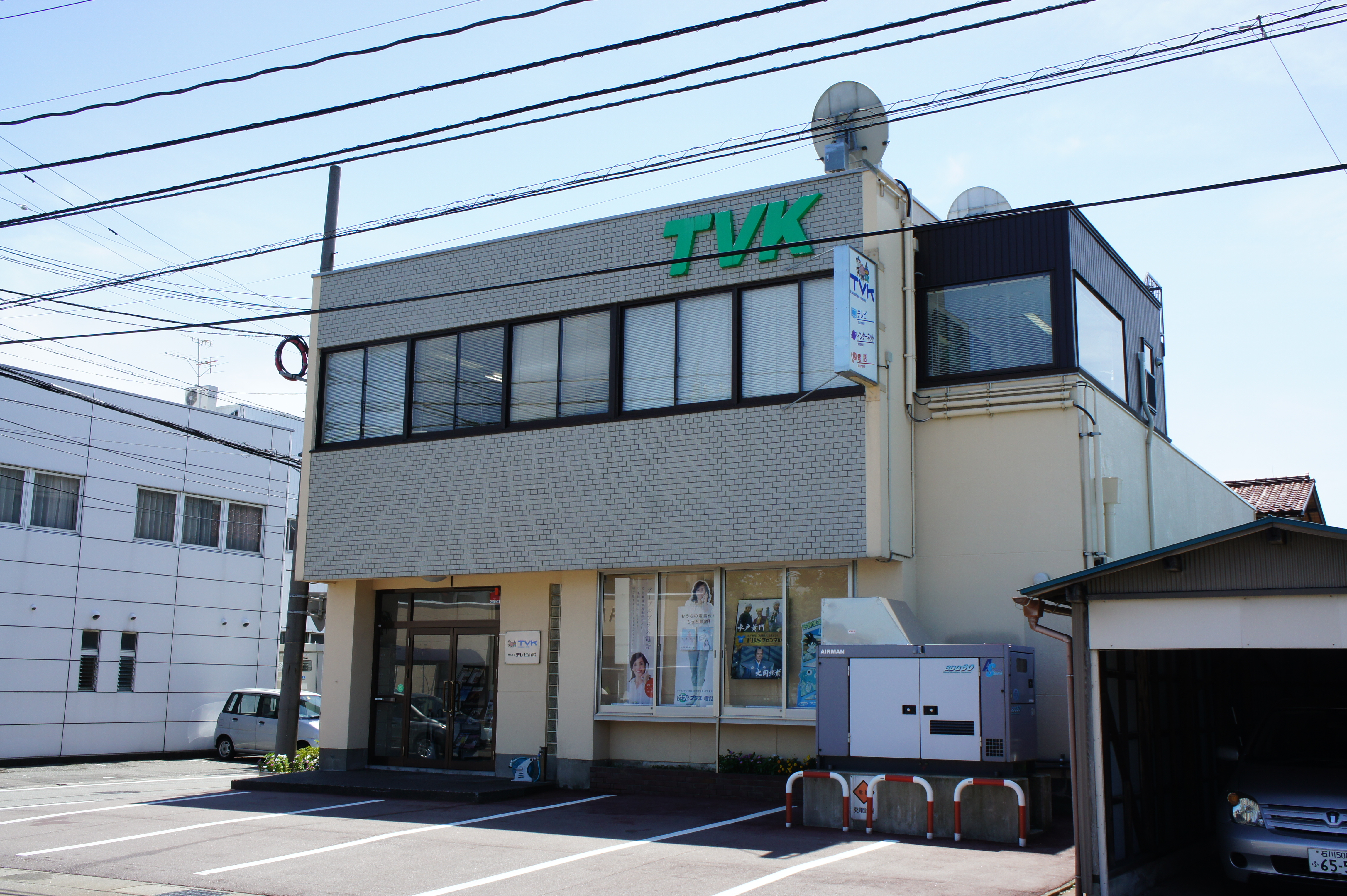 テレビ小松放送センター